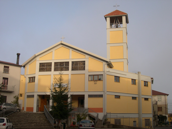 San Giovanni in Fiore. Chiesa della Santa Lucia. Facciata